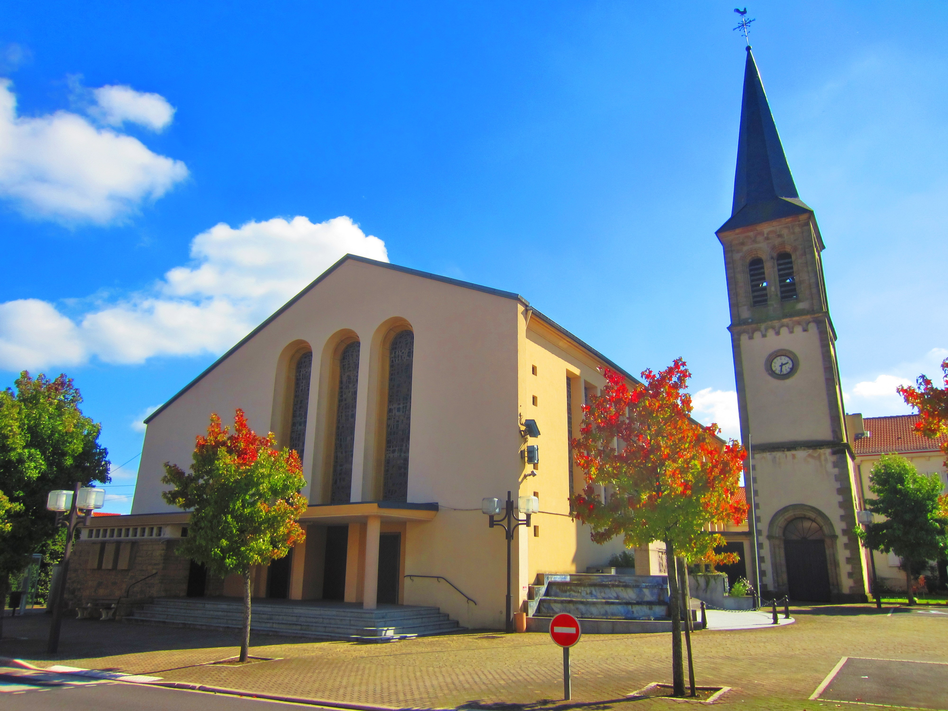 Eglise de Merten